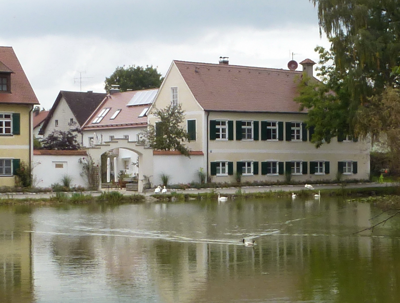 Ehemaliges Hofmarkschloß am Schloßweiher, heute BauernhofThis is a photograph of an architectural monument.